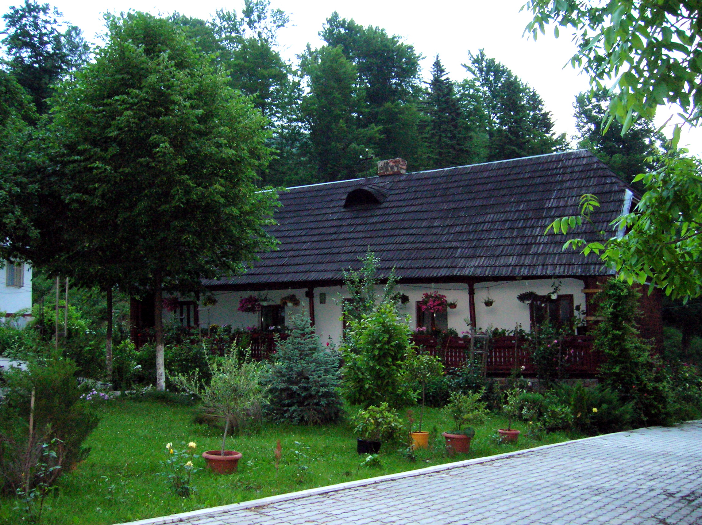 Mănăstirea Nechit se află pe Valea Pârâului Nechit şi aparţine administrativ de Comuna Borleşti